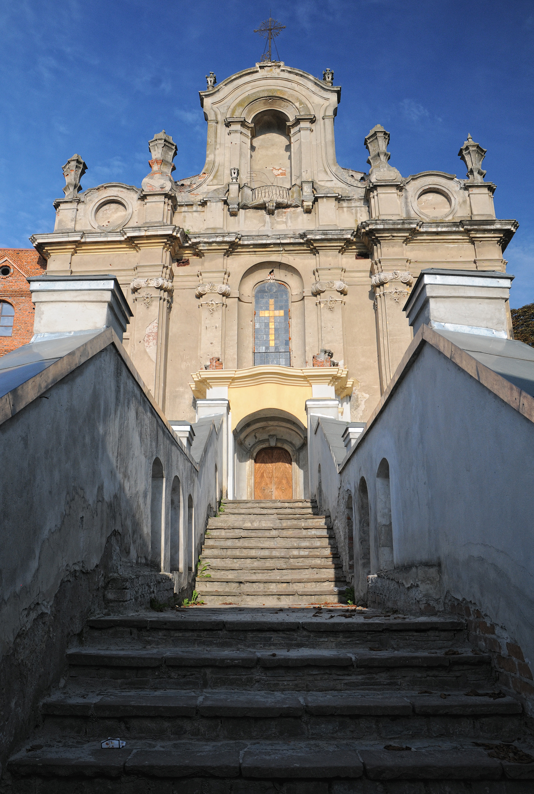 Більшівці Костел кармелітів